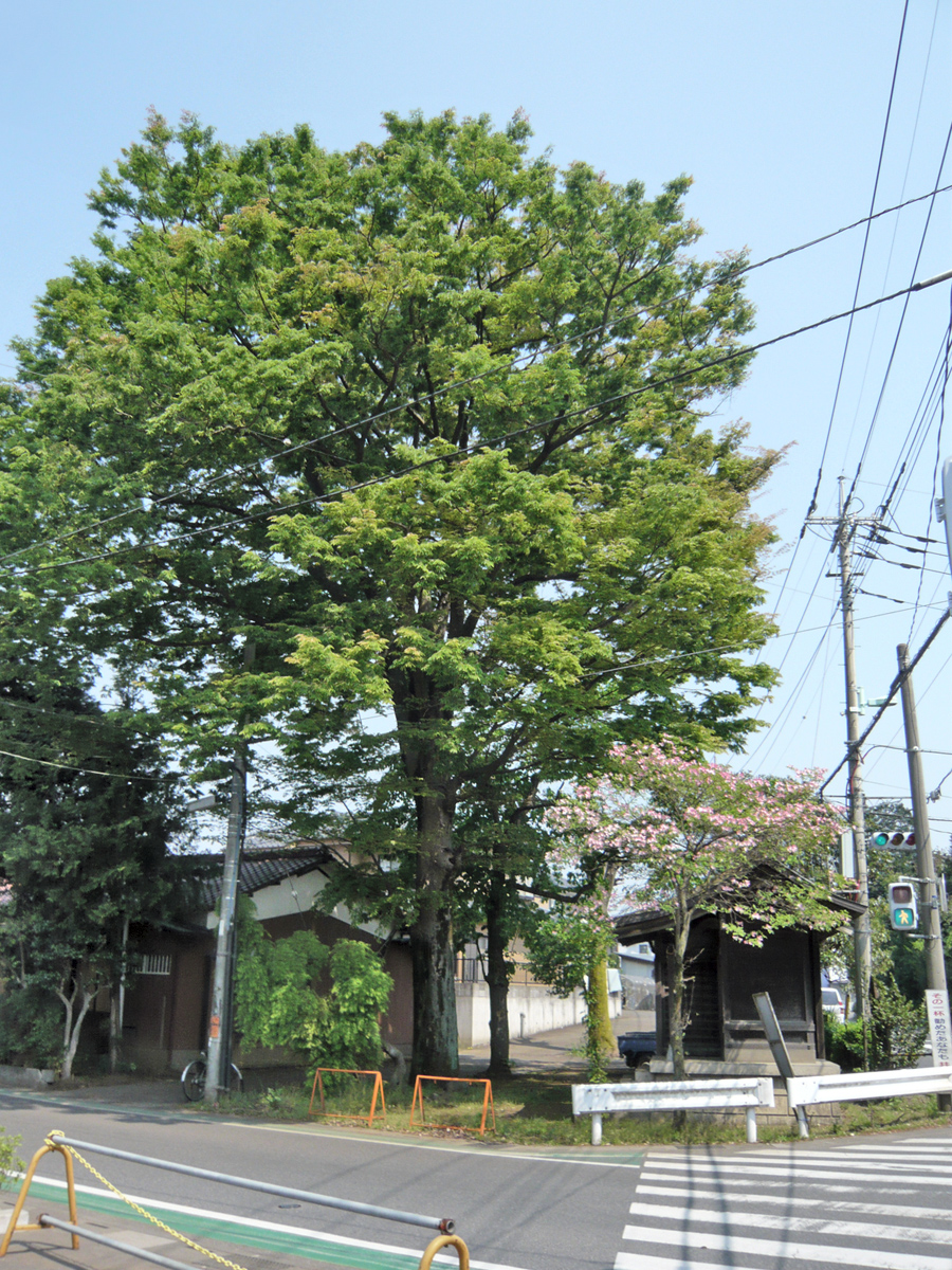 八雲神社・天王社 — 所沢市内,下富片側交差点にて。 御神木らしき一本の高木が遺されている。交差点向かい側, 湯楽の里所沢温泉 の駐車場付近より撮影